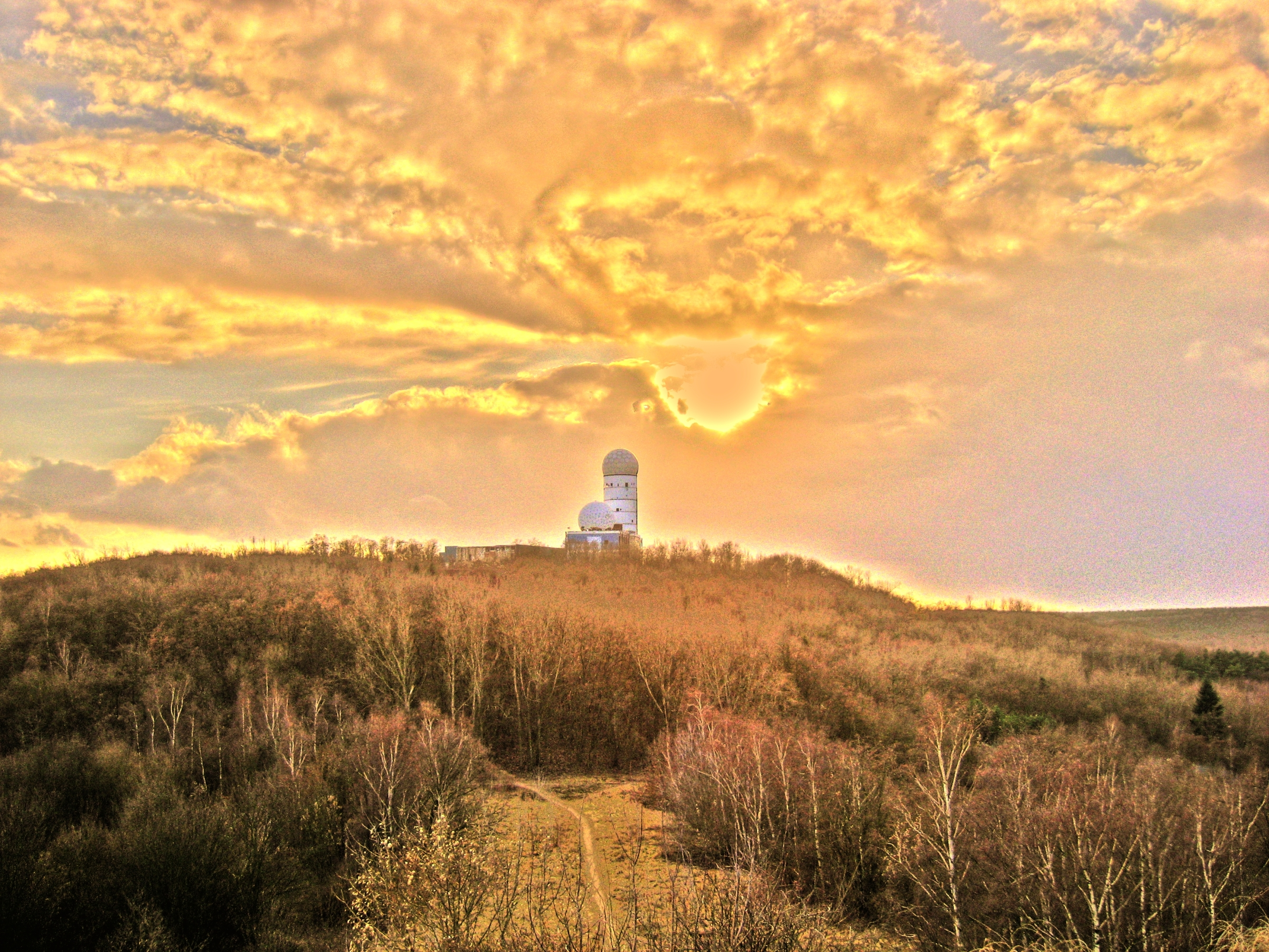 Blick vom Teufelsberg aus auf die Radargebäude in HDR.